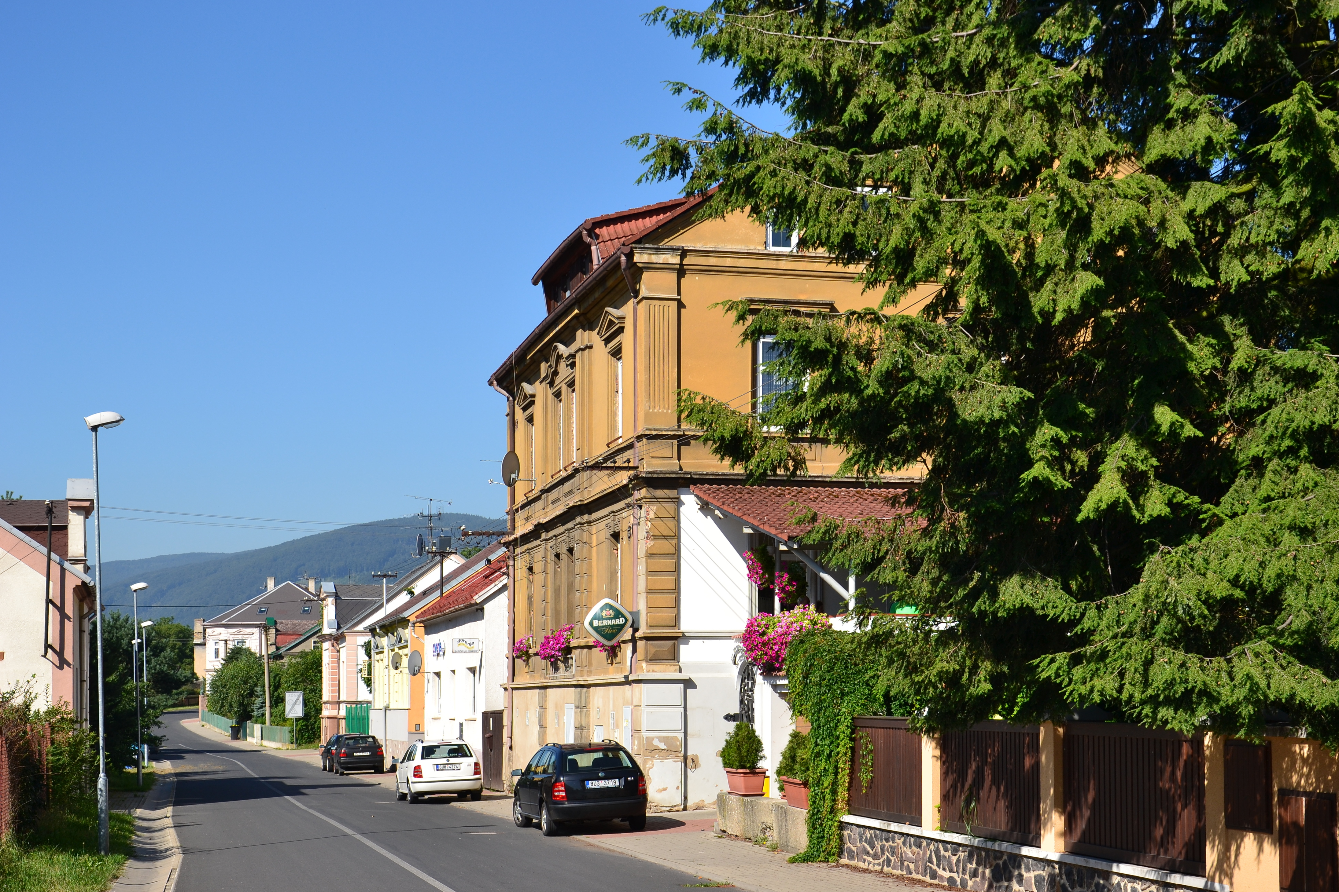 Jandečkova ulice v Hamru